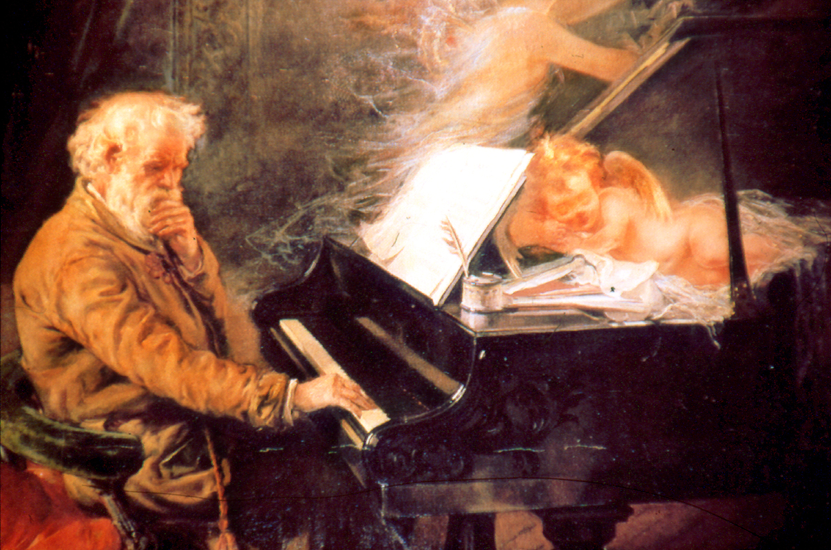 El genio dormido (1904), pintura de Eugenio Oliva y Rodrigo.